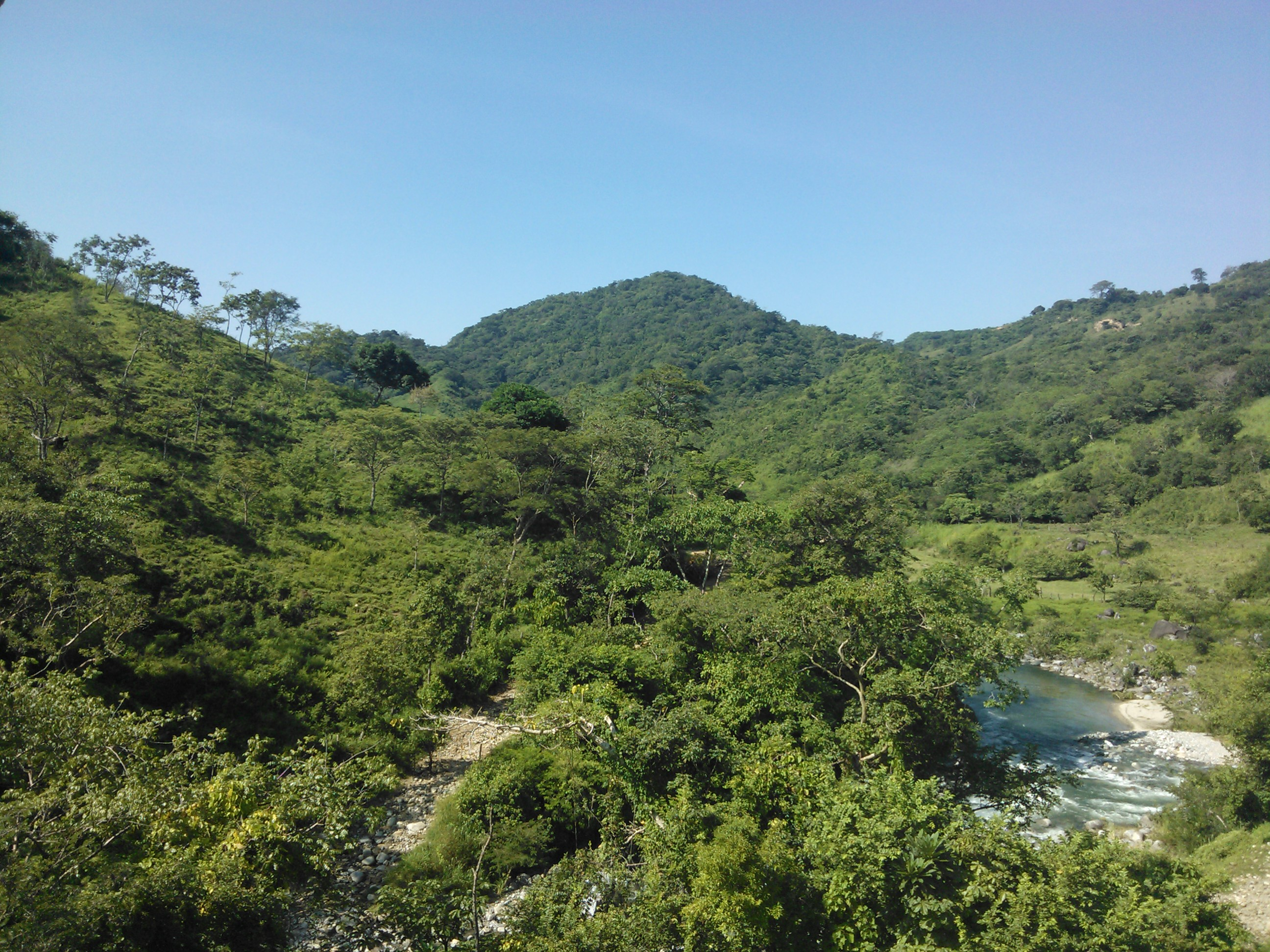 Fotografía panorámica del ejido Unión Pijijiapan, que implementó un sistema silvopastoril para eficientar producción ganadera en la parte alta de la cuenca del río Coapa, en Pijijiapan, Chiapas.